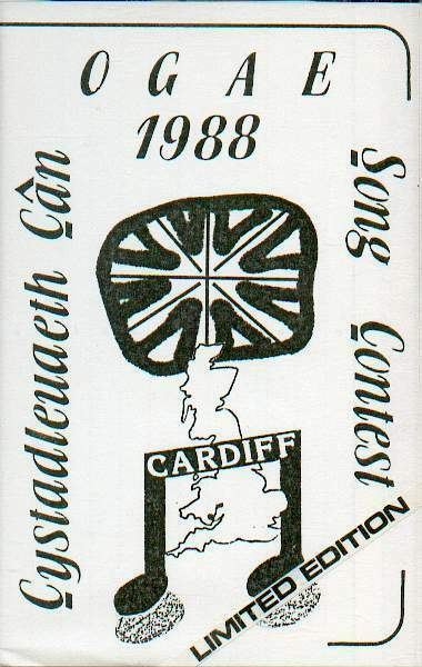 Logo del evento ogae song contest de 1988